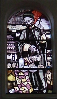 Kirchenfenster in der Pfarrkirche Liesing (Wien 23) gestaltet von Martin Häusle. selbst fotografiert im März 2007